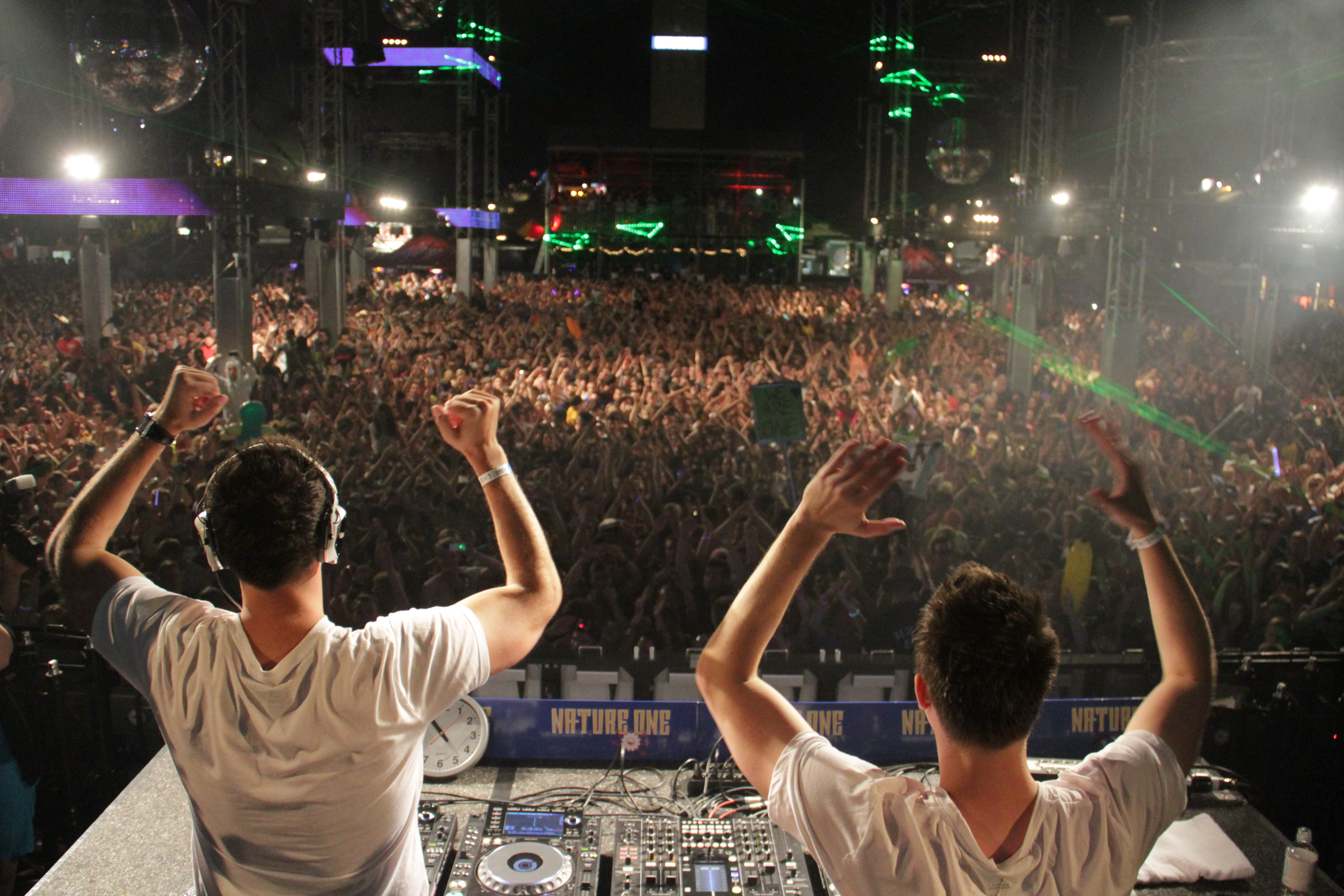 Das Publikum auf dem Open Air Floor beim Nature One 2013, im Vordergrund W&W